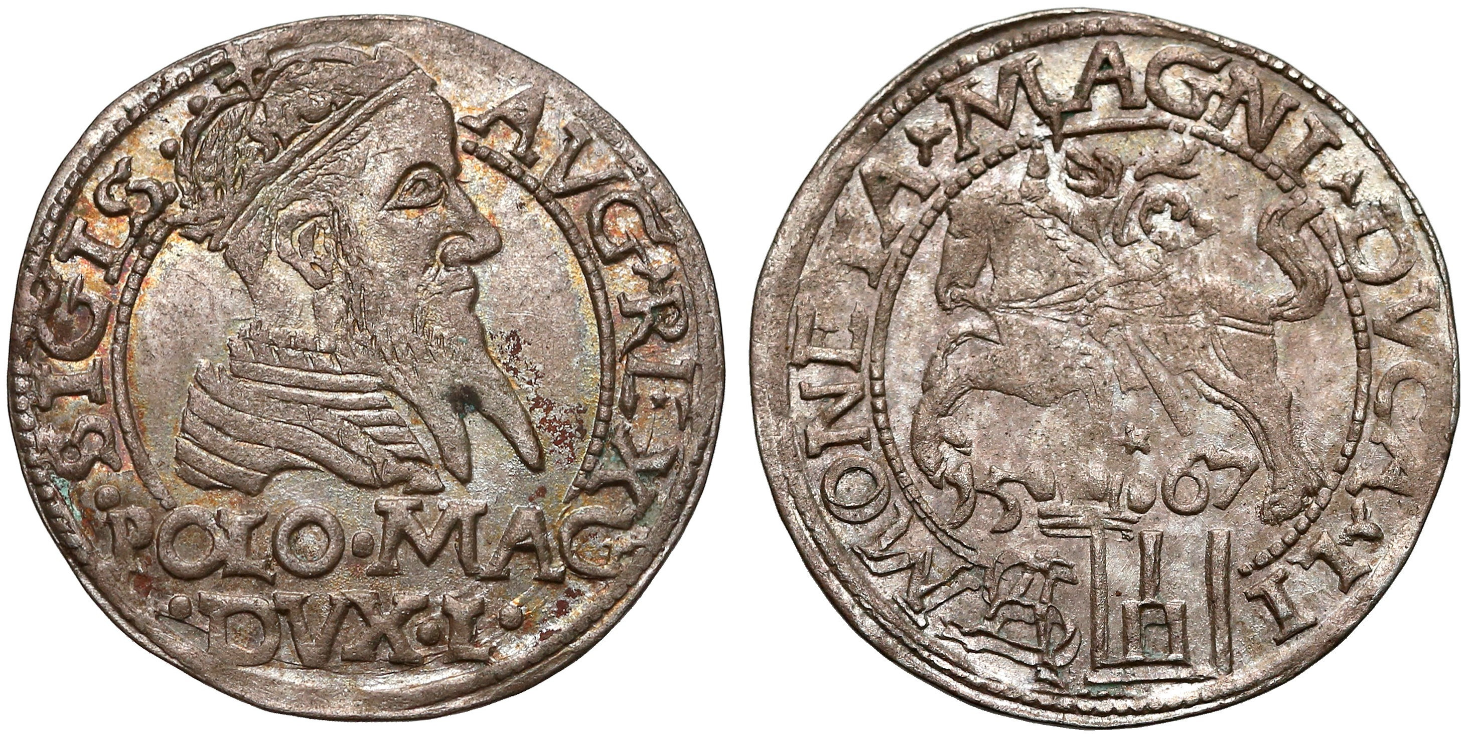 Grosz na stopę polską 1567 Tykocin